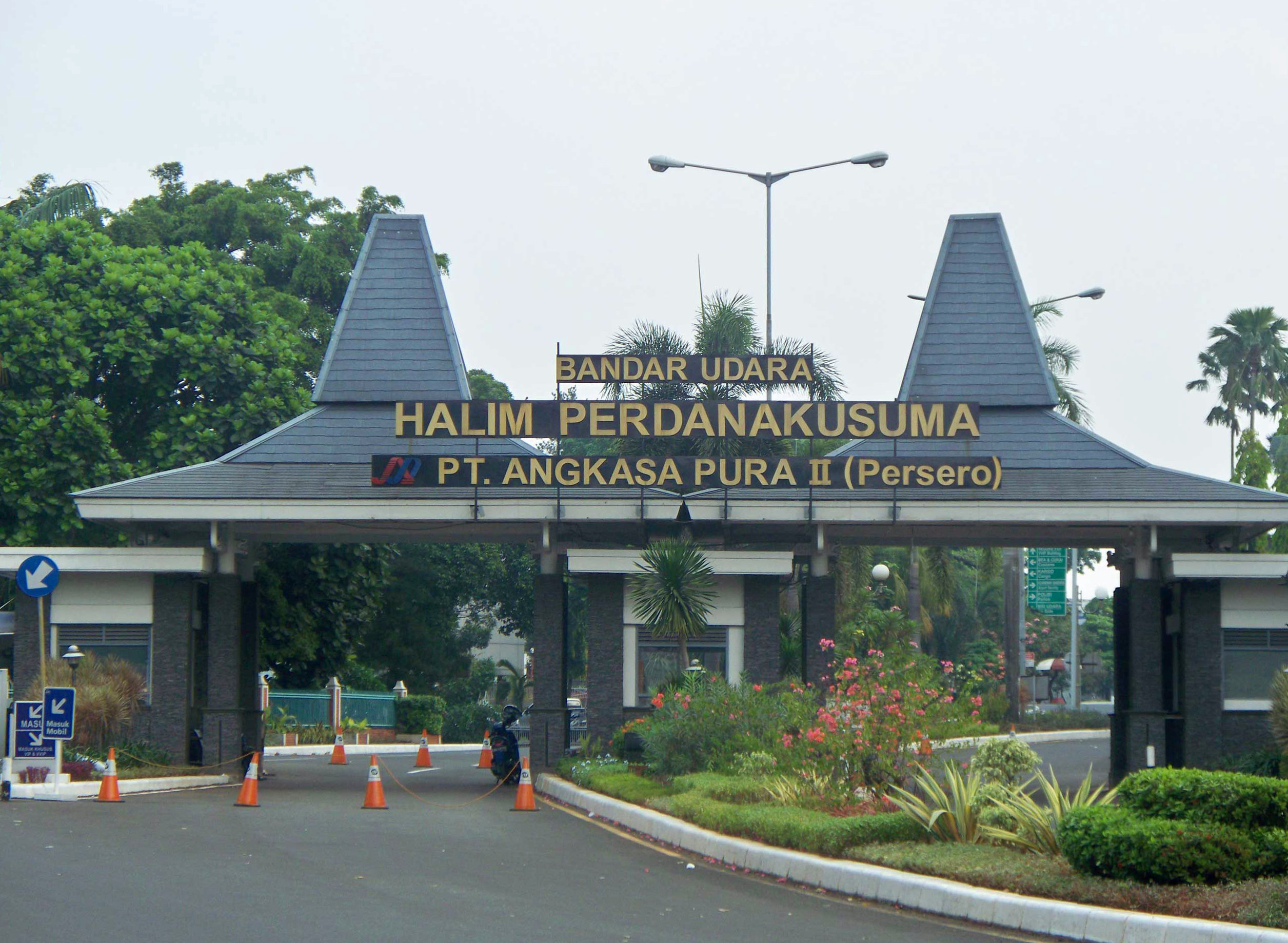 Bandar Udara Halim